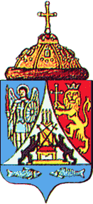 Герб Соединённые гербы великих княжеств